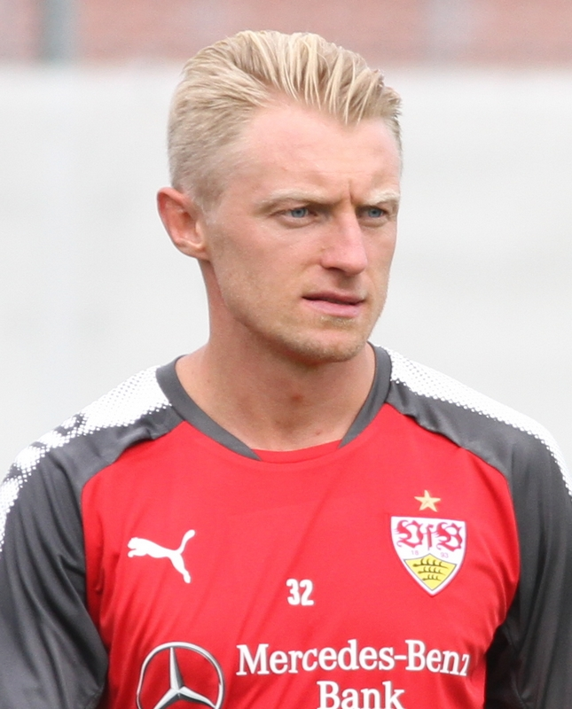 Andreas Beck beim ersten öffentlichen Training. Aufgenommen von